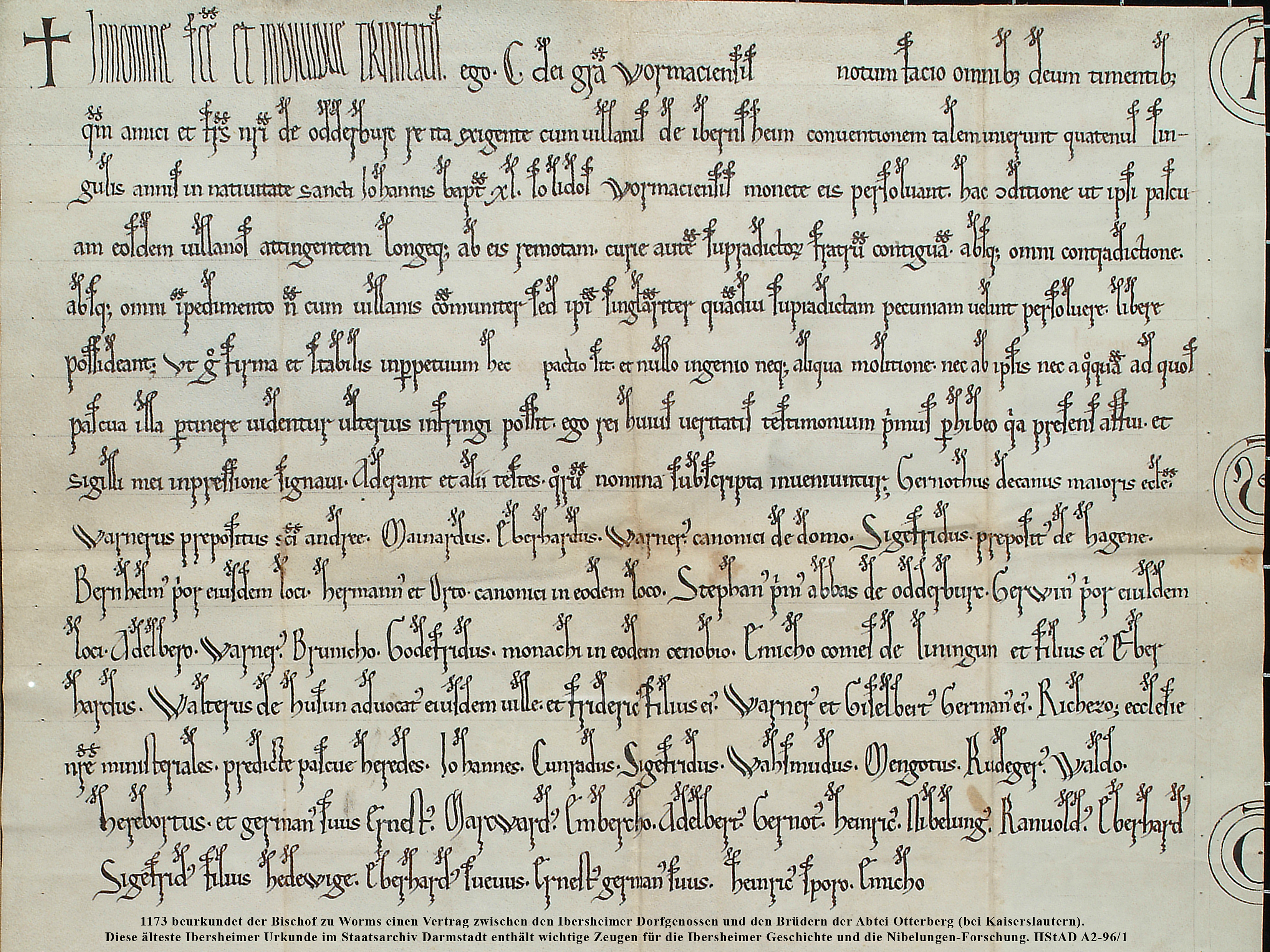 Vertrag Ibersheimer Dorfgenossen mit Kloster Otterberg von 1173